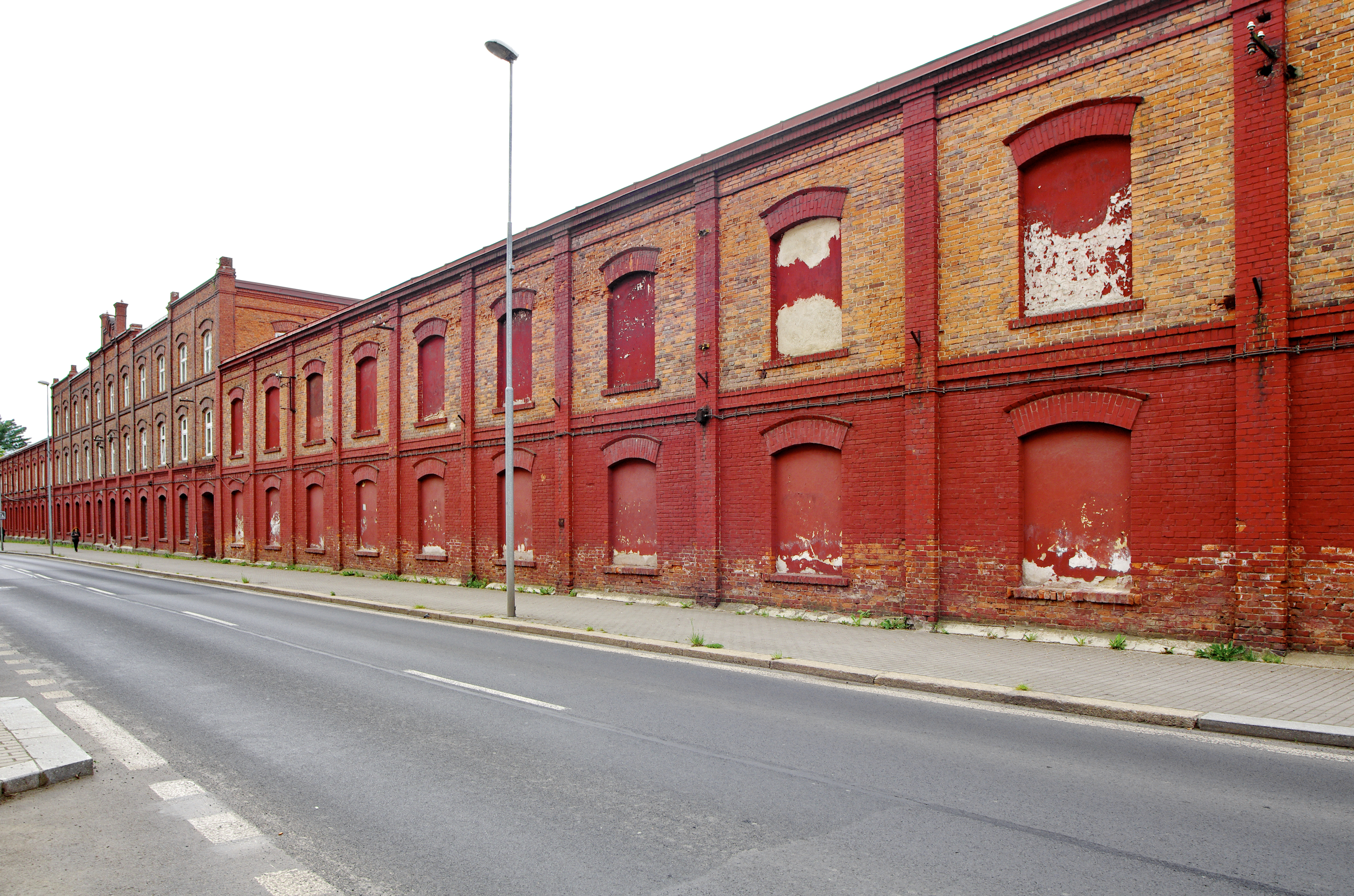 Kraslice, budovy kde za 2. světové války byl ženský koncentrační tábor, spadající ke konci války pod koncentrační tábor Flossenbürg